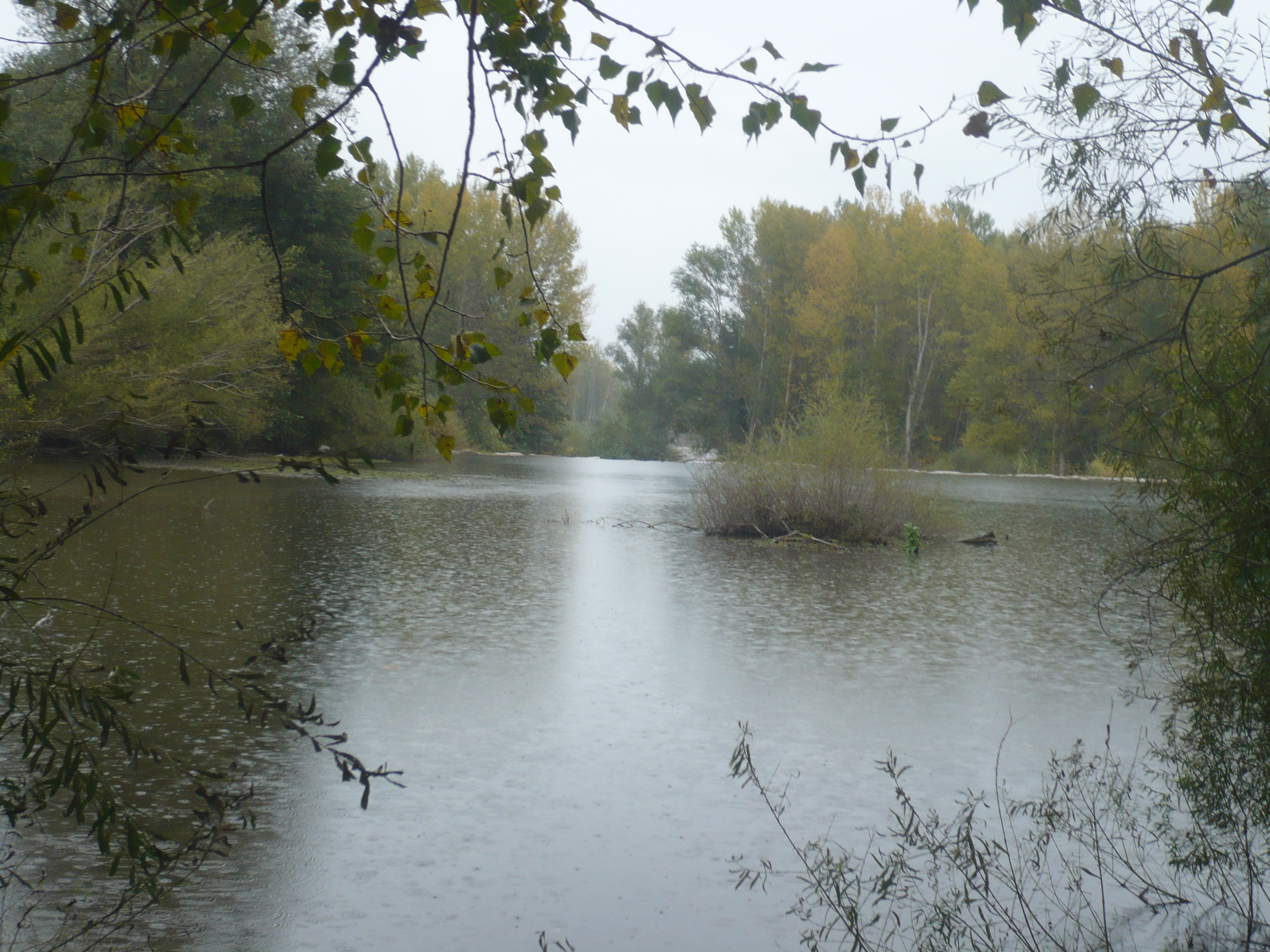 Le Tech à Nidolères